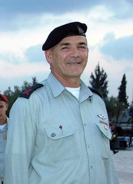 Maj. General Avi Mizrahi, IDF